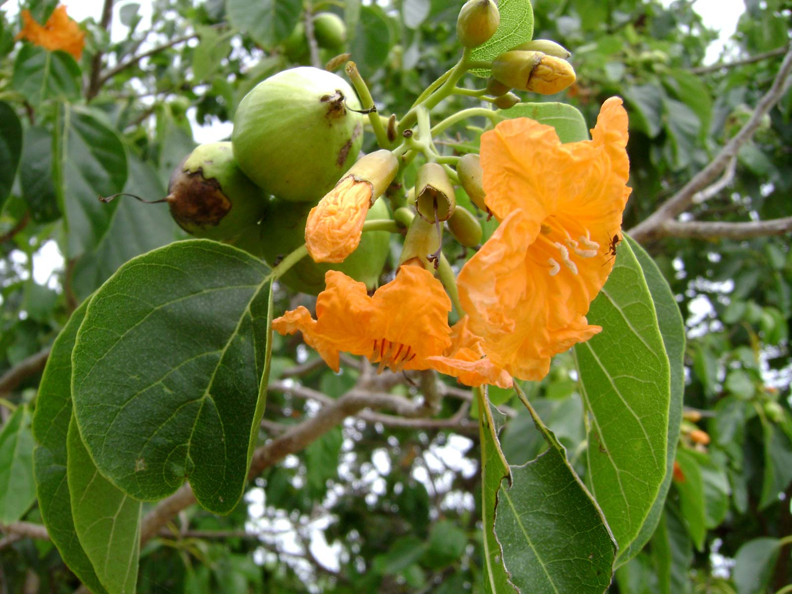 Cordia subcordata; {puataukanave} in Tonga